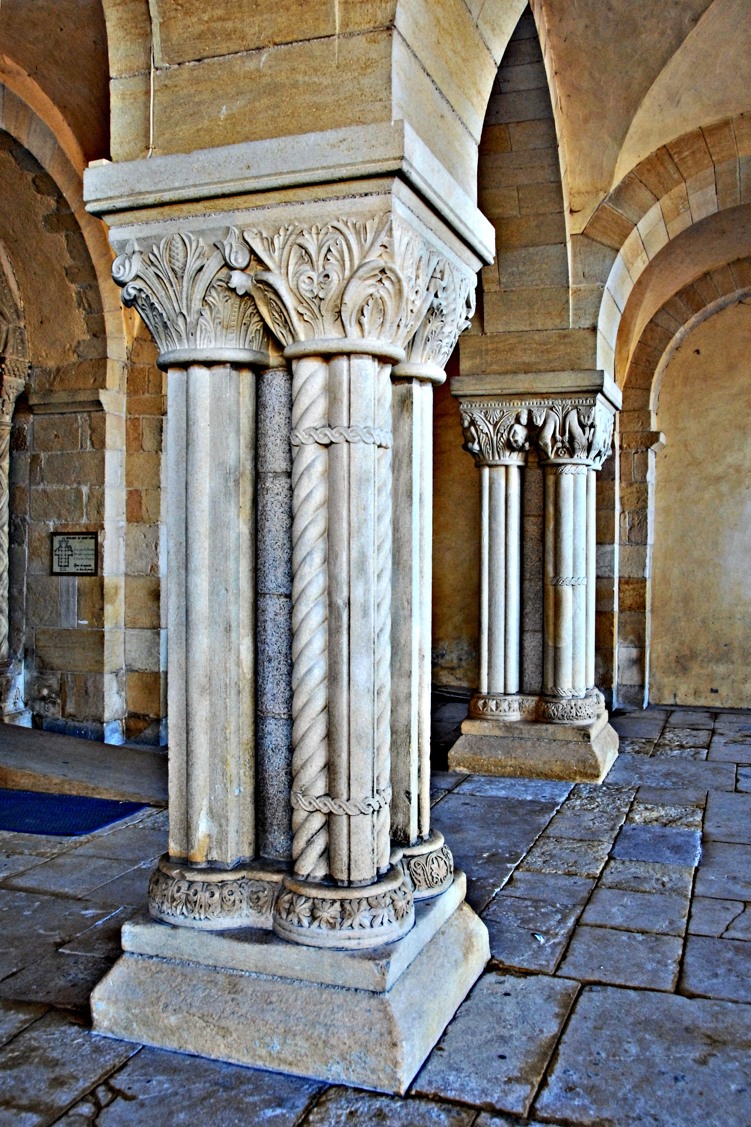 Doppelkapitell Narthex, kantonierte Pfeiler